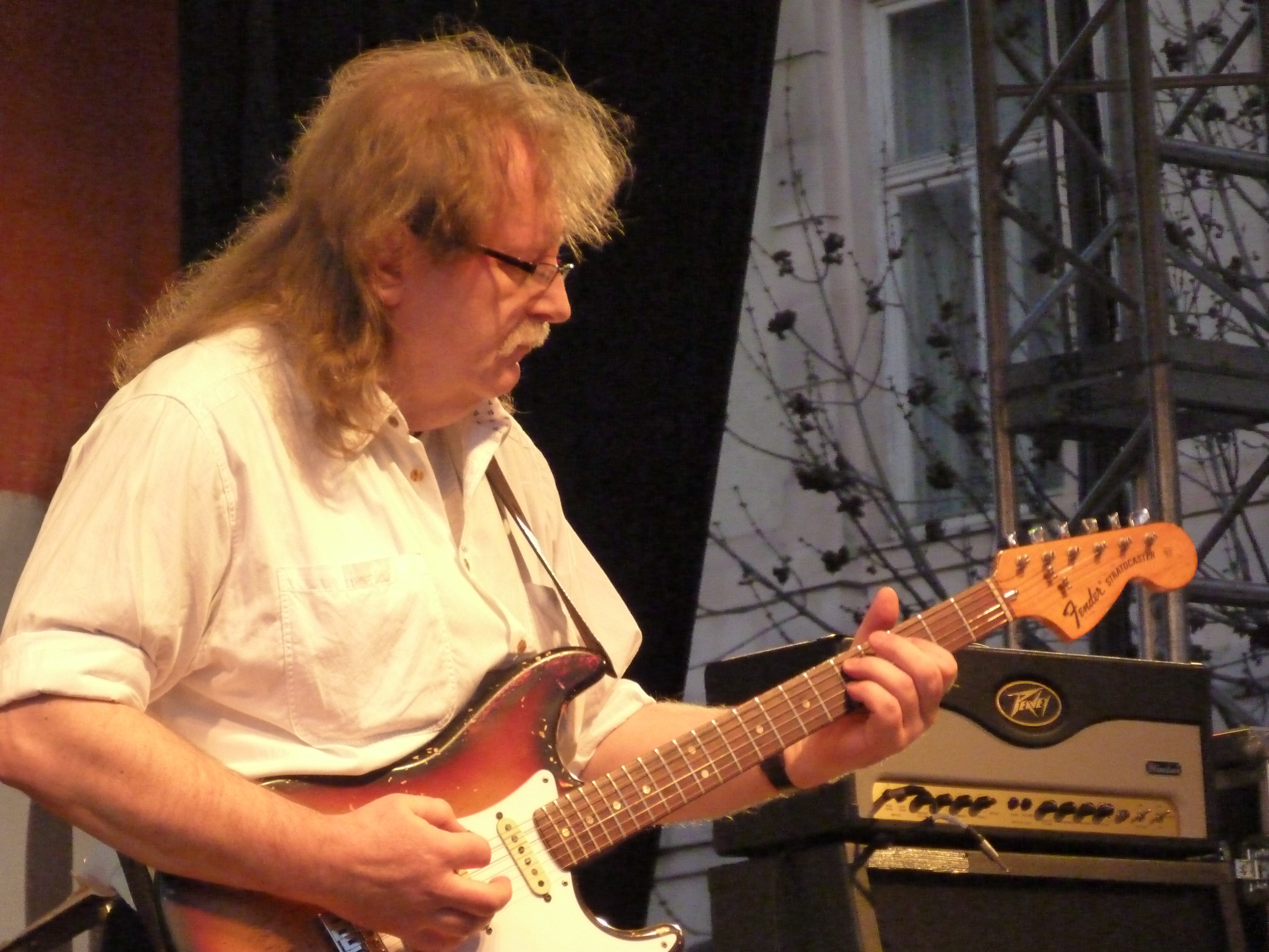 A felvétel 2012. március 15 -én készült Budapesten, a Deák téren. A P. Mobil együttes. Megjelent Creative Commons alatt a Metapolisz DVD sorozatban.